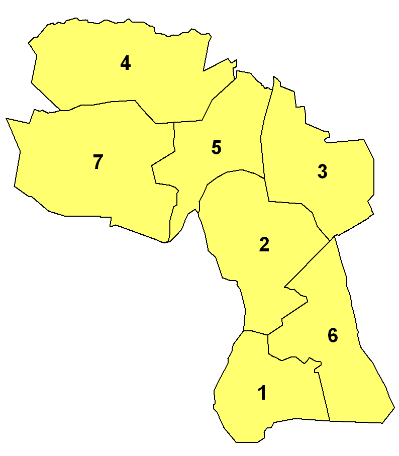 Gemeindegliederung des Landkreises Grafschaft Bentheim. Einheitsgemeinden 1. Bad Bentheim, Stadt 2. Nordhorn, Stadt, Selbständige Gemeinde 3. Wietmarschen Samtgemeinden 4. Samtgemeinde Emlichheim 5. Samtgemeinde Neuenhaus 6. Samtgemeinde Schüttorf 7. Samtgemeinde Uelsen